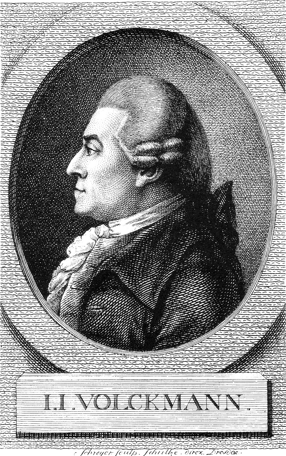 Johann Jacob Volkmann (1732-1803), Brustbild, Profil nach links